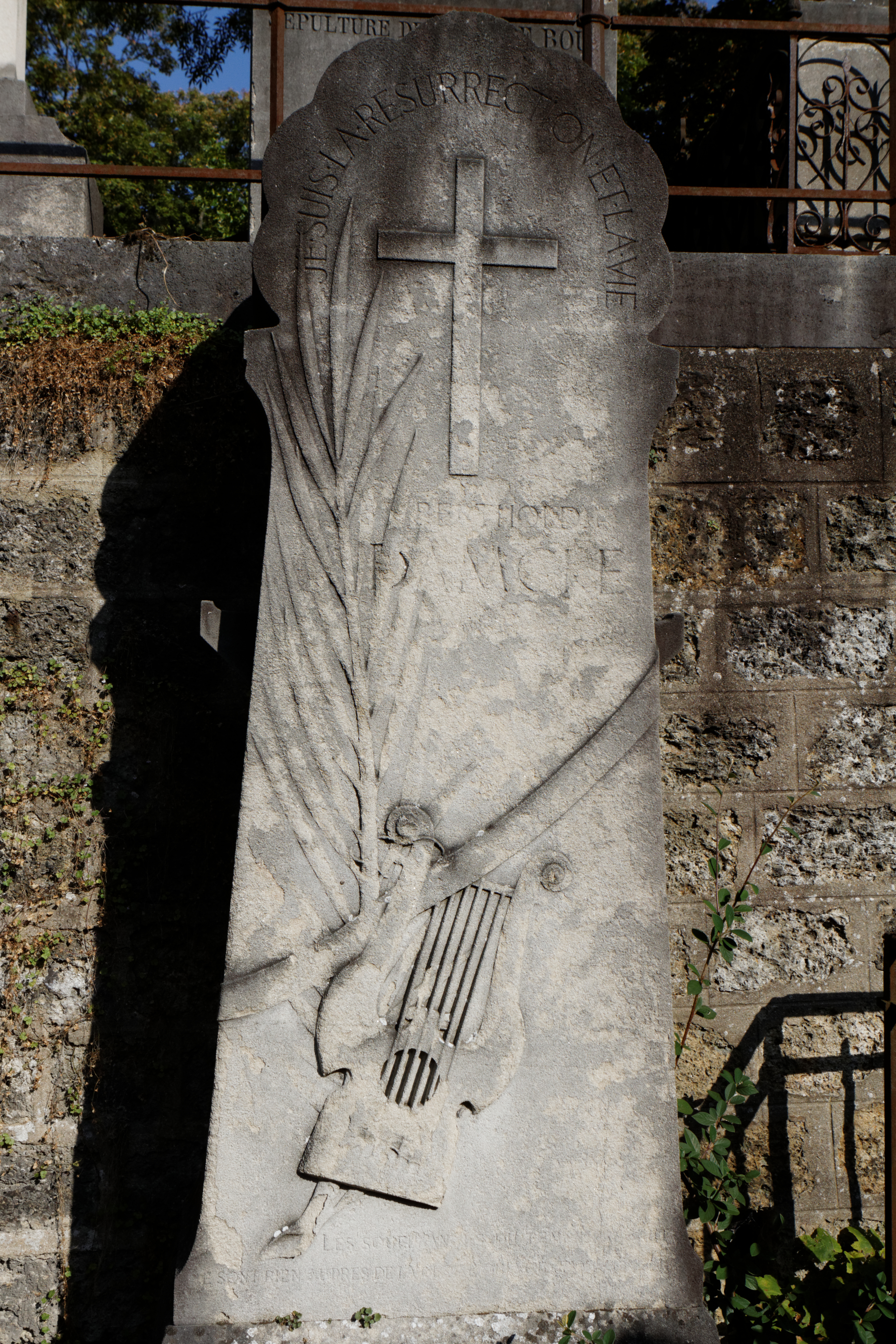 Sépulture de Berthold Damcke (1812-1875), musicien allemand, professeur de piano à Saint-Pétersbourg et exécuteur testamentaire de Berlioz. Stèle ornée d'une lyre.